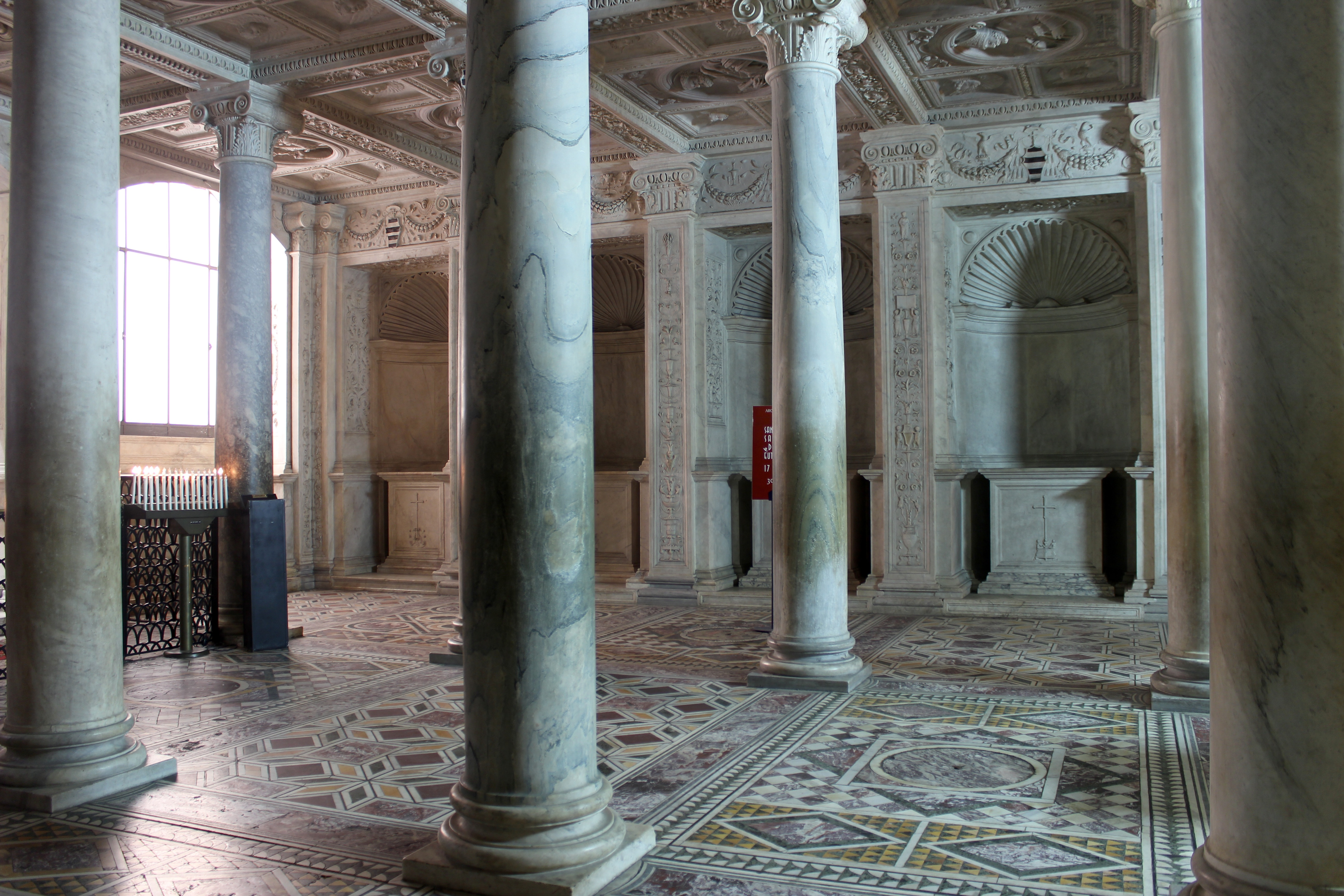 Catedral de Nápoles, cripta bajo el presbiterio.